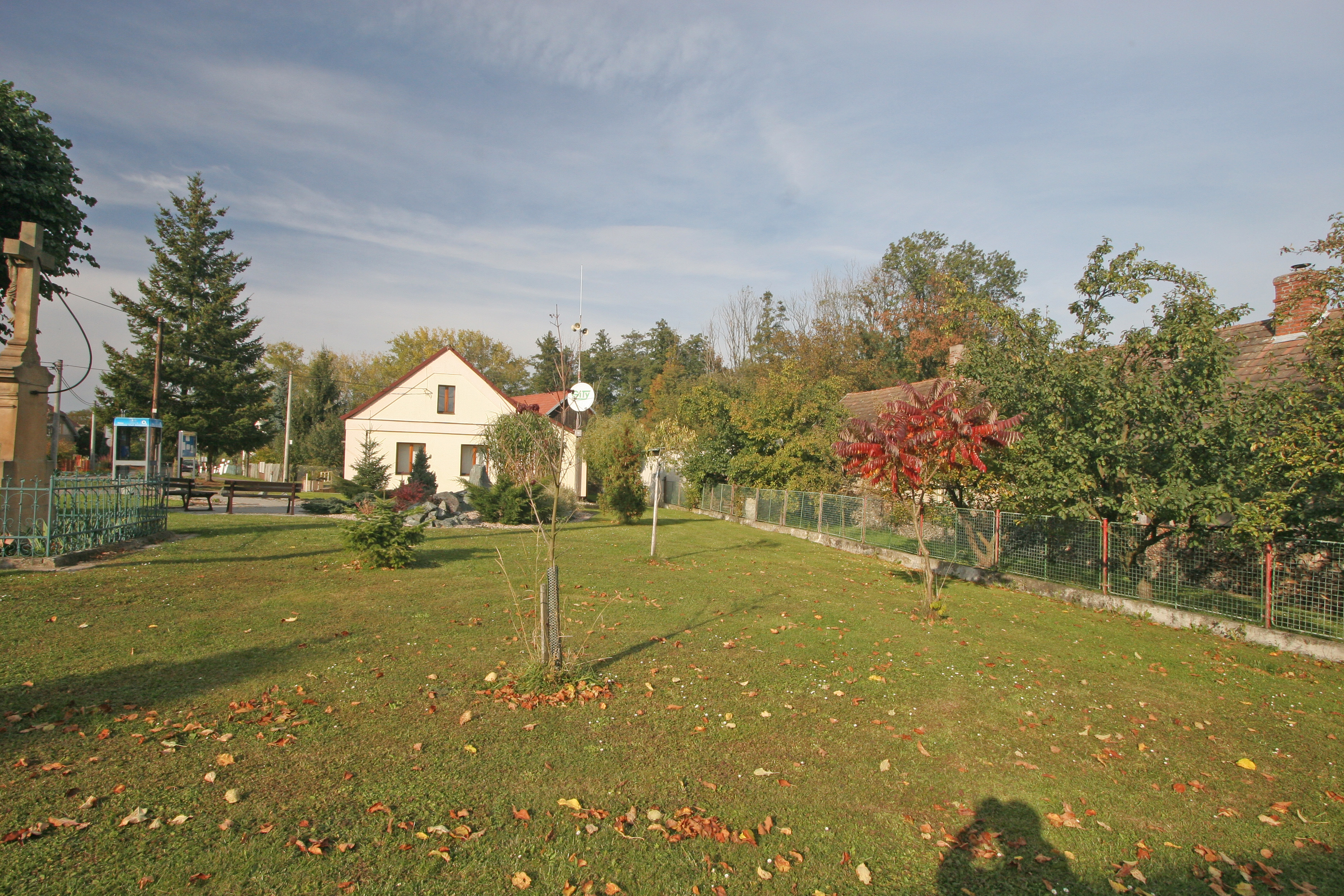 Libníkovice obecní úřad